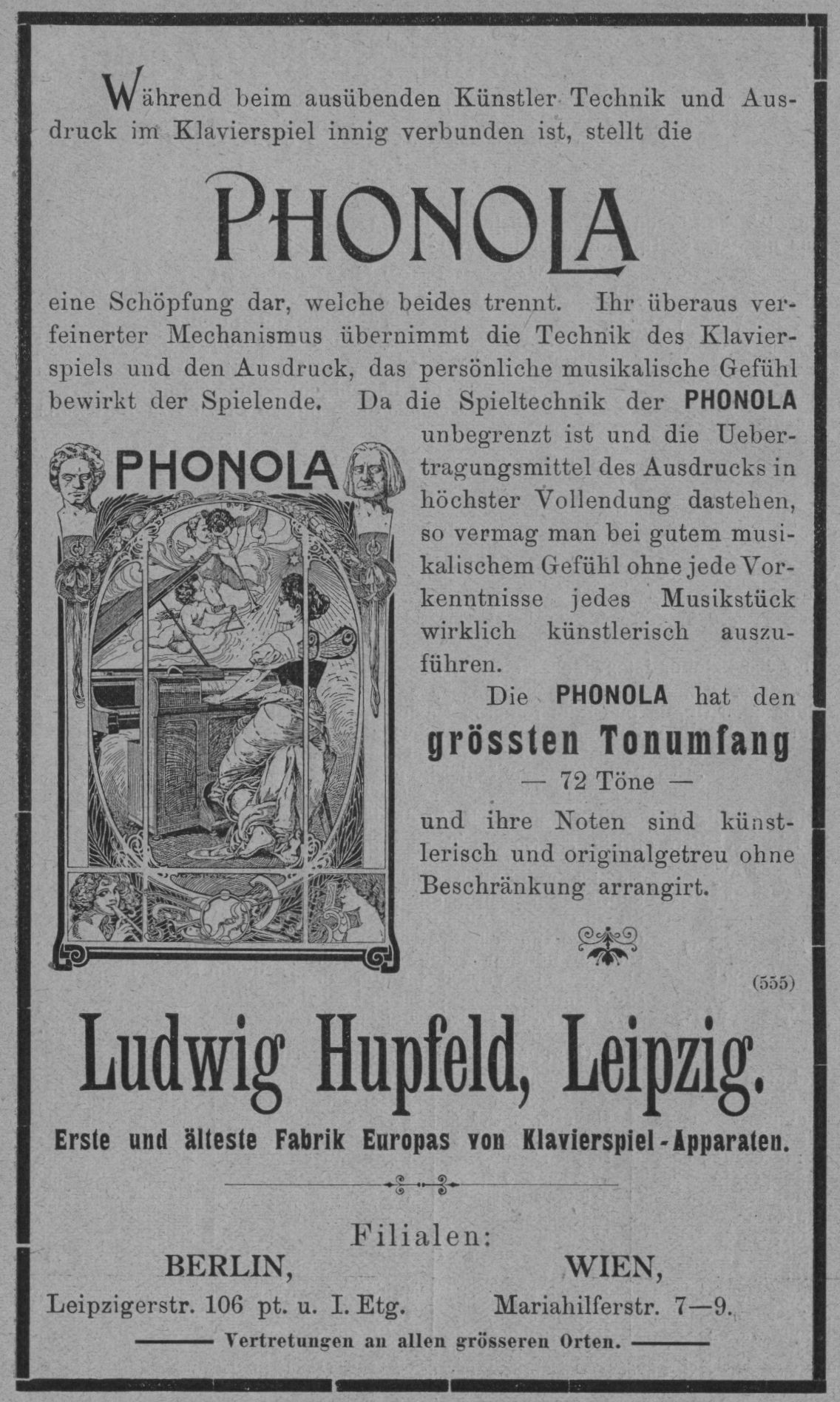 Werbung für die Phonola von Ludwig Hupfeld in Trowitzsch's Volkskalender 1904. LXXVII. Jahrgang. Seite XV. Trowitzsch & Sohn Berlin, Wilhelm-Straße 29. 1903. Text: Während beim ausübenden Künstler Technik und Aus- druck im Klavierspiel innig verbunden sind, stellt die PHONOLA eine Schöpfung dar, welche beides trennt. Ihr überaus ver- feinerter Mechanismus übernimmt die Technik des Klavier- spiels und den Ausdruck, das persönliche musikalische GEfühl bewirkt der Spielende. Da die Spieltechnik der PHONOLA unbegrenzt ist und die Ueber- tragungsmittel des Ausdrucks in höchster Vollendung dastehen, so vermag man bei gutem musi- kalischem Gefühl ohne jede Vor- kenntnisse jedes Musikstück wirklich künstlerisch auszu- führen. Die PHONOLA hat den grössten Tonumfang 72 Töne und ihre Noten sind künst- lerisch und originalgetreu ohne Beschränkung arrangirt. (555) Ludwig Hupfeld, Leipzig. Erste und älteste Fabrik Europas von Klavierspiel-Apparaten. Filialen: BERLIN, Leipzigerstr. 106 pt. u. 1 Etg. WIEN, Mariahilfstr. 7-9. Vertretungen an allen größeren Orten